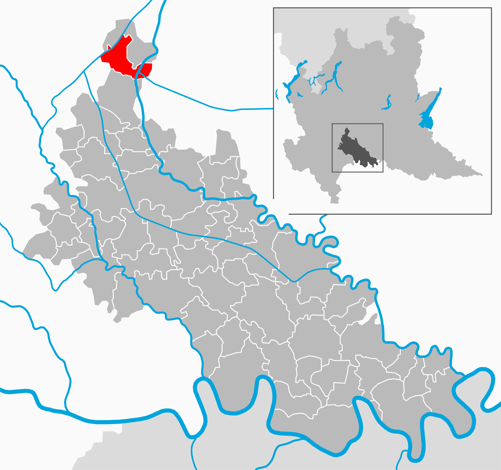 Il comune di Merlino nella provincia di Lodi